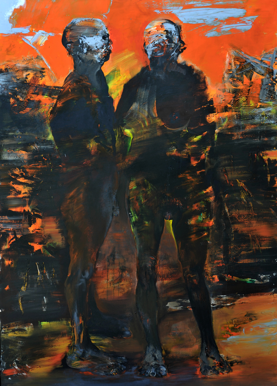 Franta, Fukushima (2012), akryl, plátno 193 x 130 cm